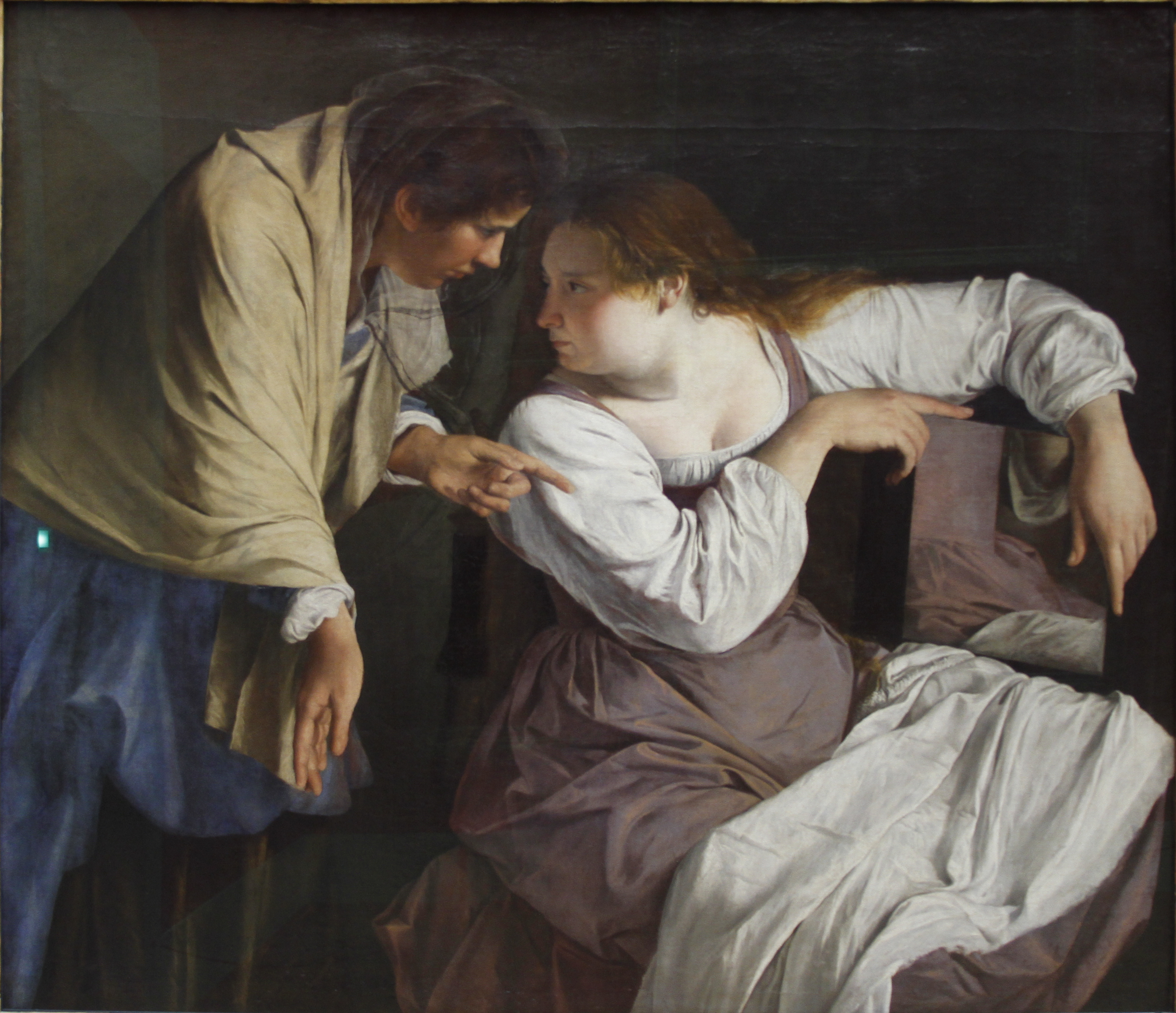 Alte Pinakothek - Munich - Germany